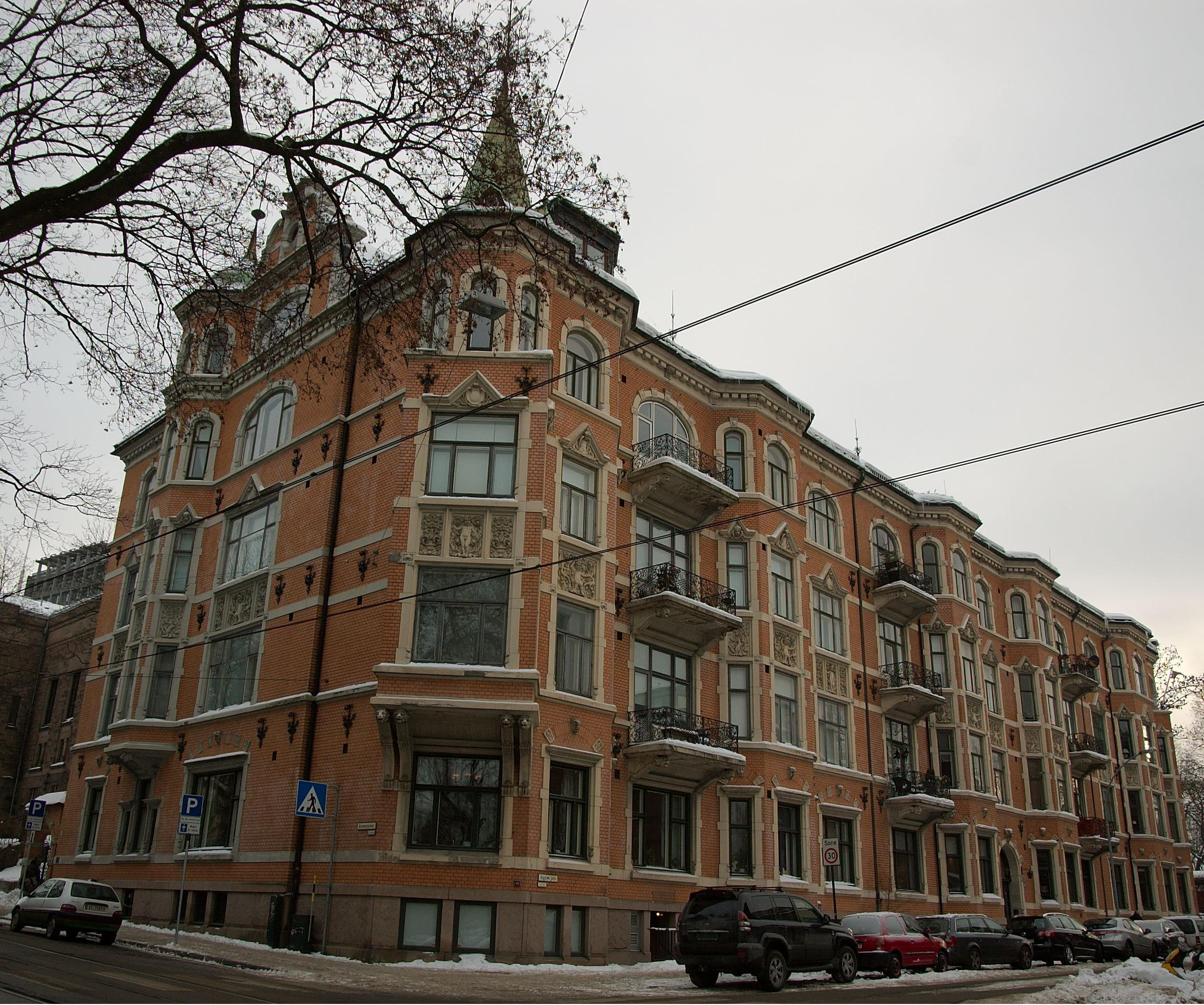 Sverreslottet tegnet av arkitekt Ole Sverre. Stor hjørnegård Drammensveien 44b og Thomles gate 4-6